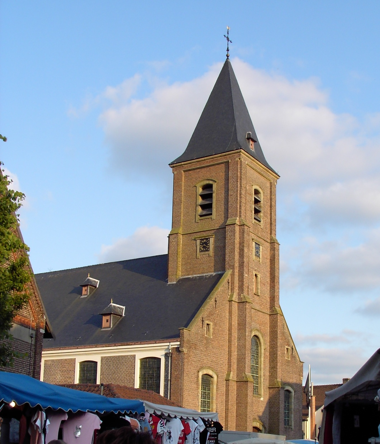 Sint-Niklaaskerk te Zwijnaarde (België), zelf getrokken foto.